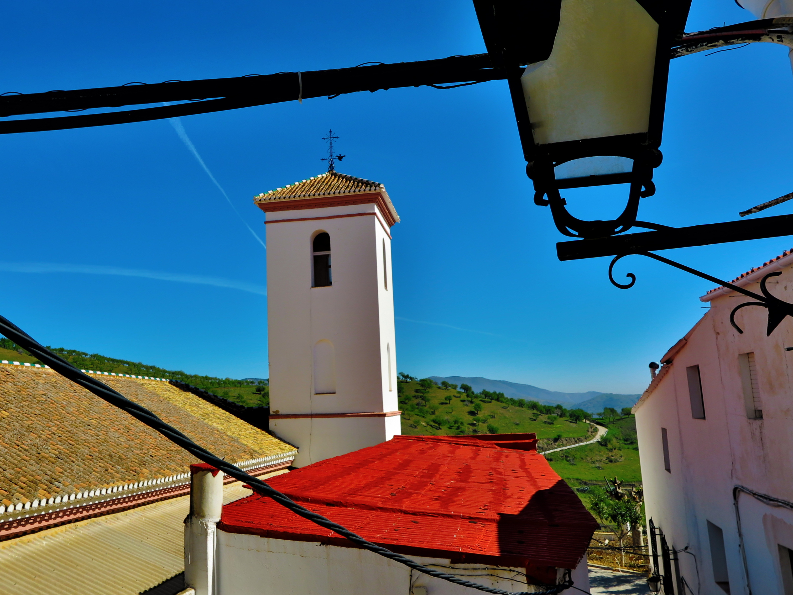 Albondón, iglesia parroquial